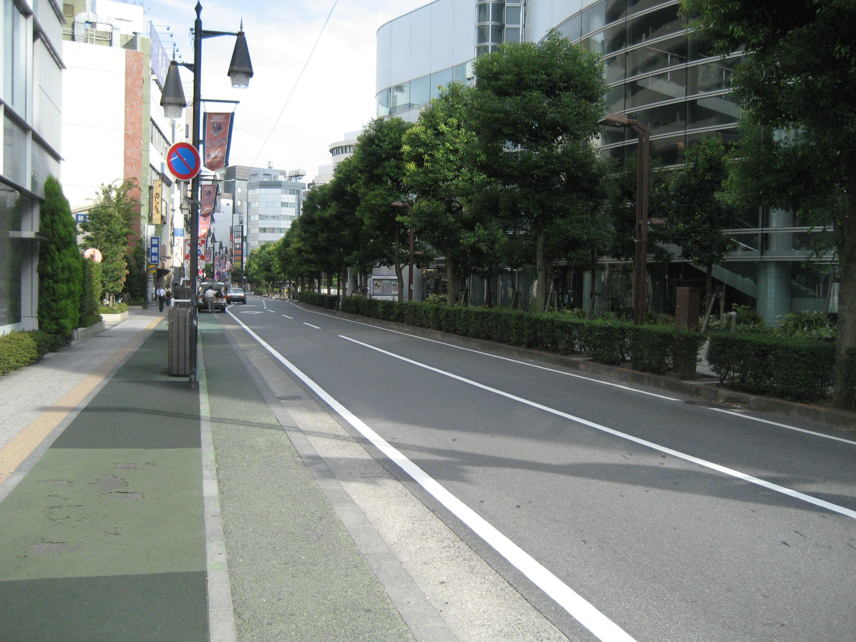 埼玉県道121号線大宮駅西口方面